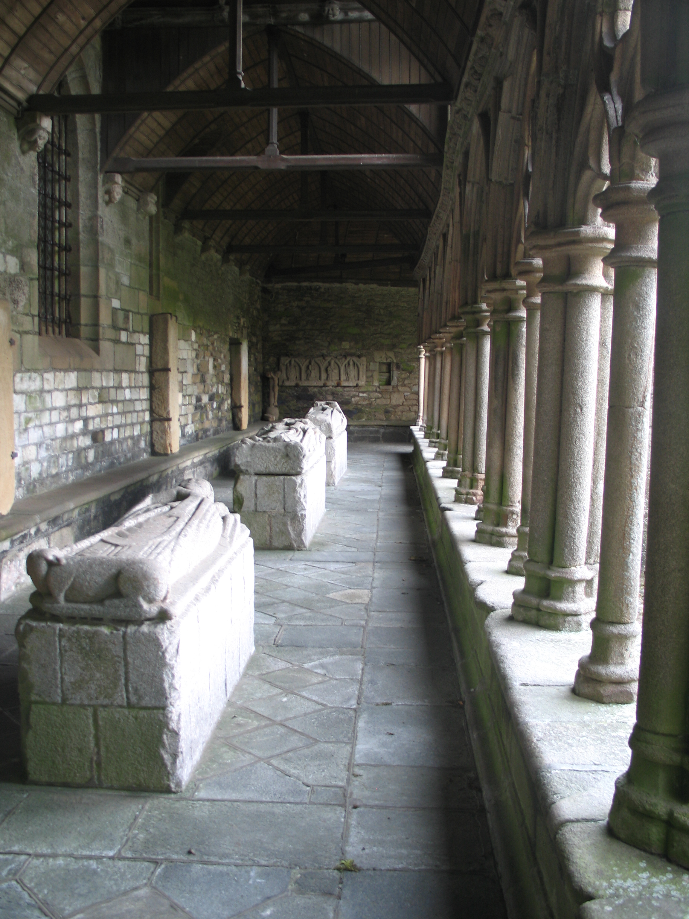 Cathédrale Saint-Tugdual de Tréguier (Bretagne). Intérieure de l'aile occidentale du cloître.